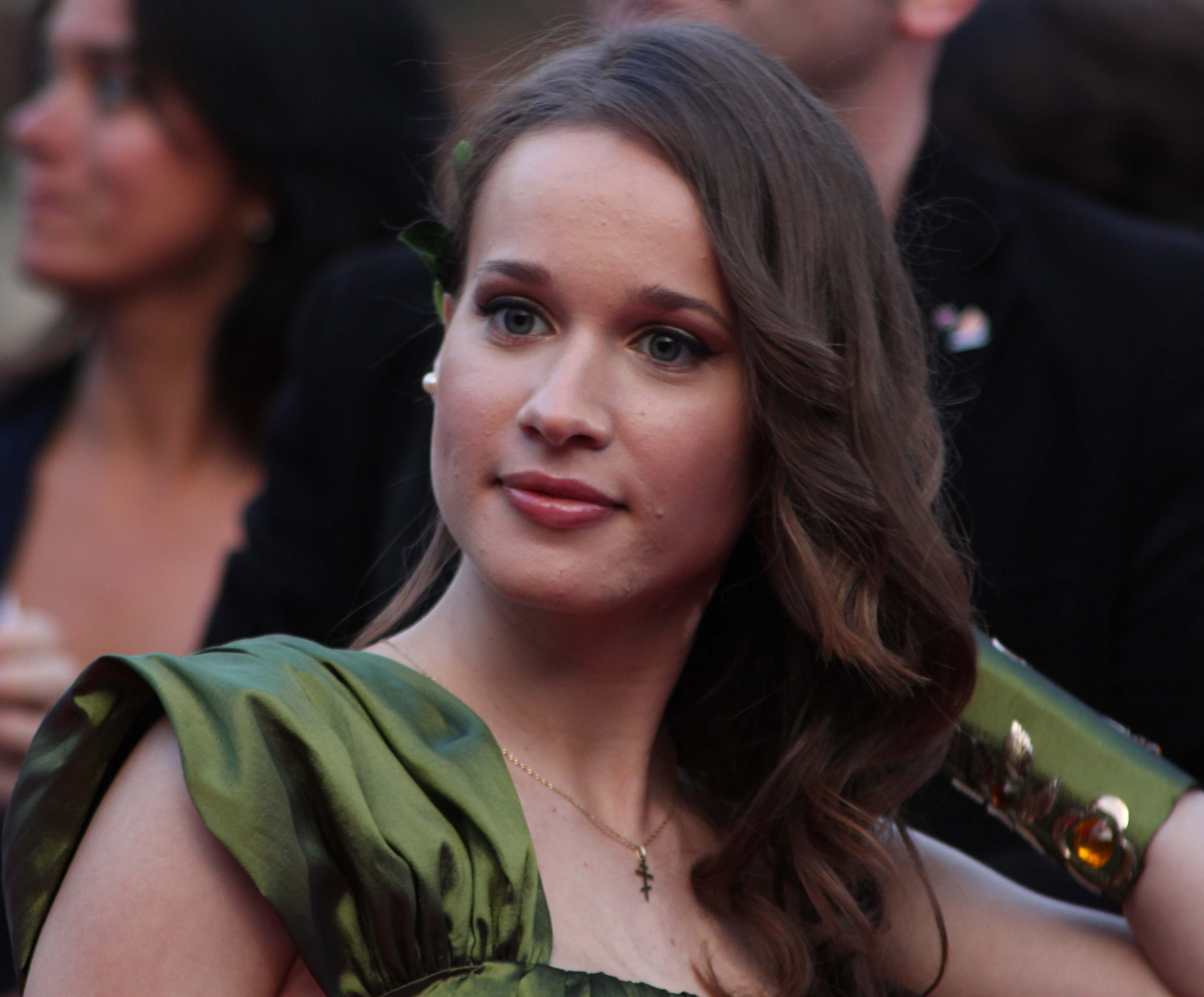 Foto: Vincent Hasselgård, Aktiv I Oslo.no